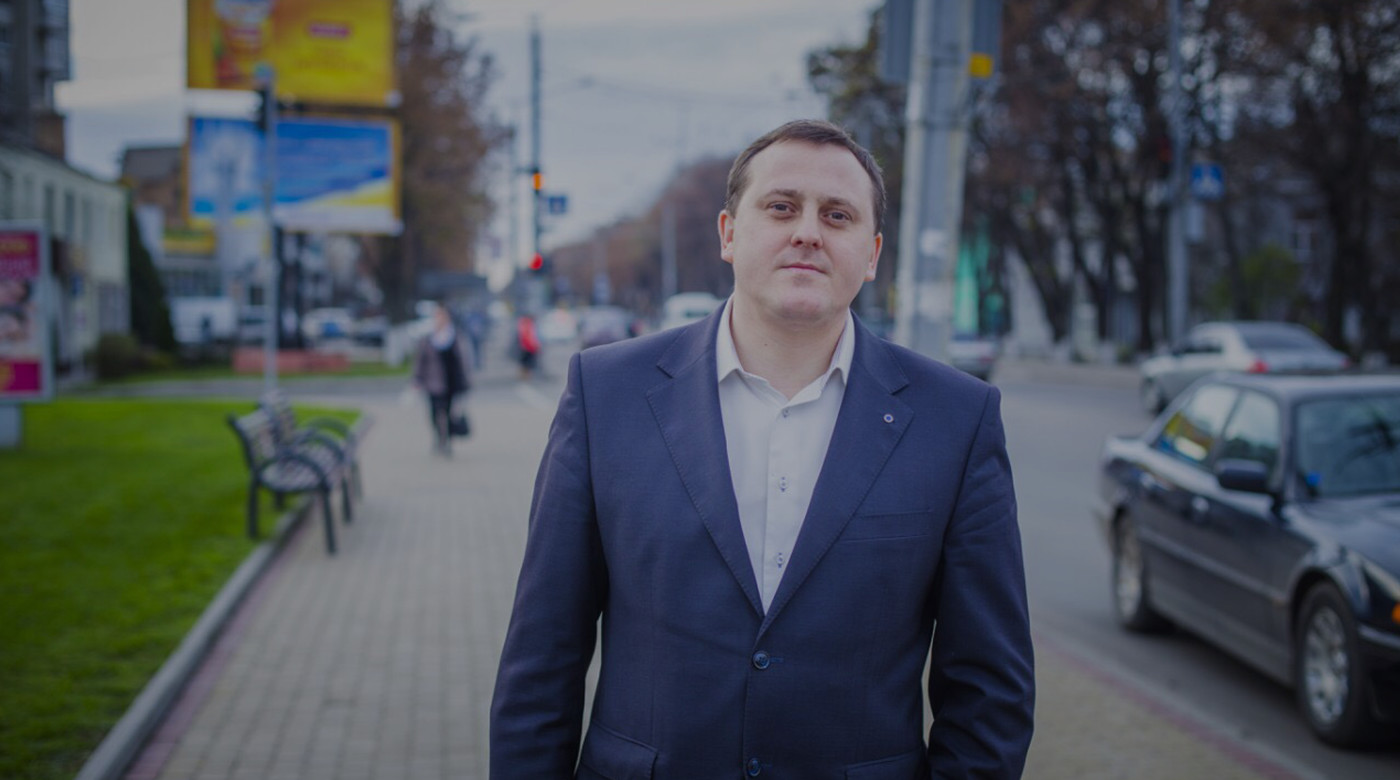 Андрій Осіпов